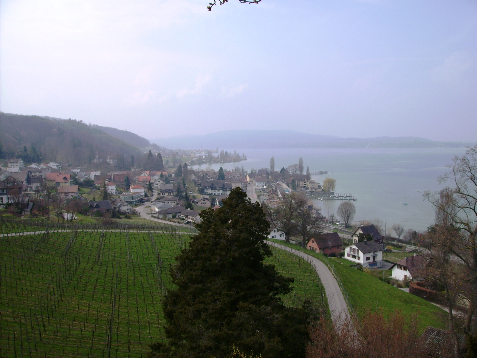 Schloss Arenenberg, Schweiz. Wohnsitz der Königin Hortense de Beauharnais und des späteren Kaisers Napoleon III. Ausblick auf den Bodensee